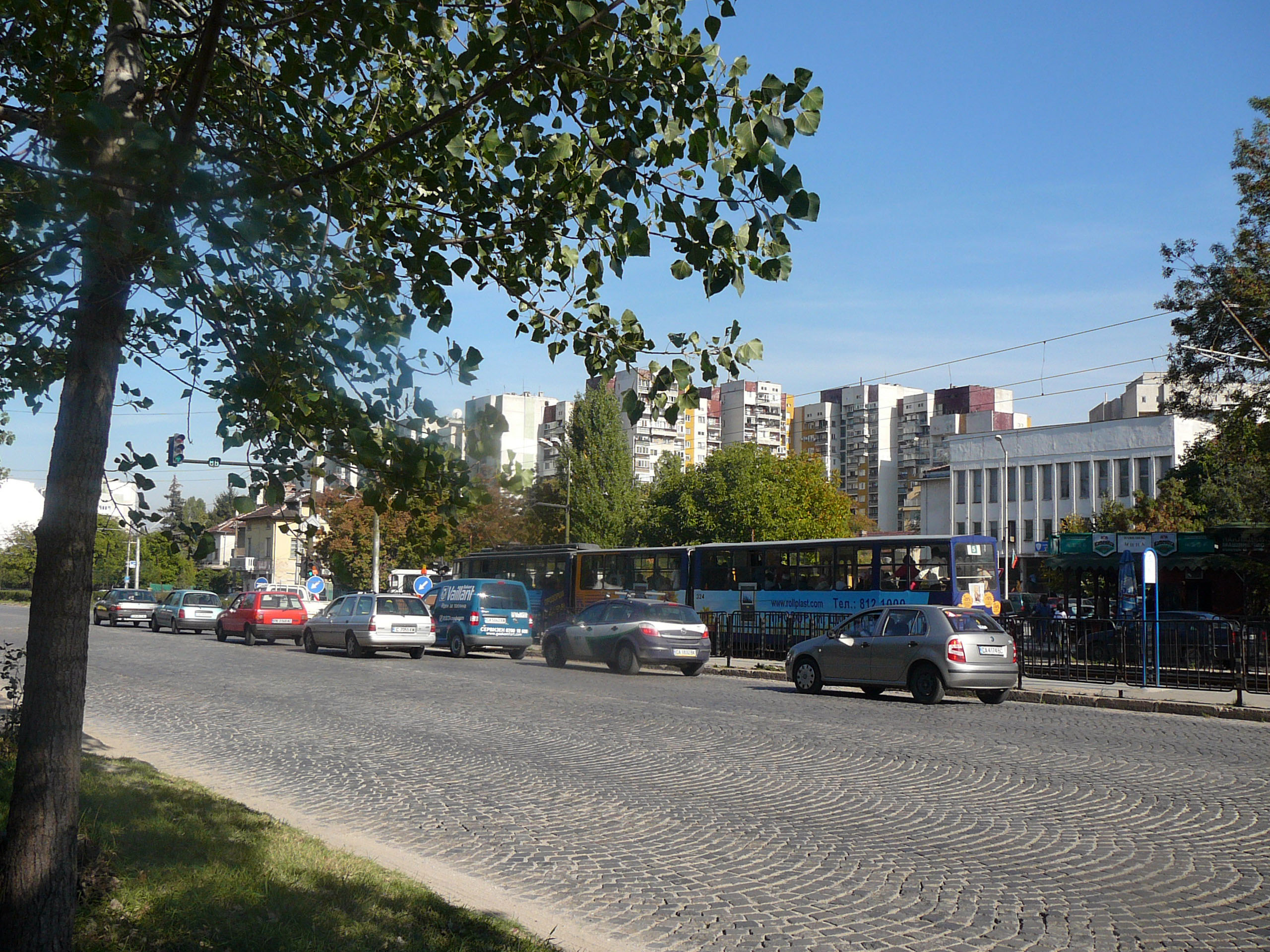 Template:Картинка инфо